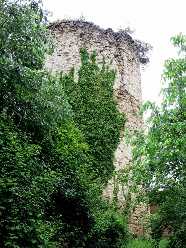 castell de Sales de Llierca a la Comarca de la Garrotxa - Catalunya